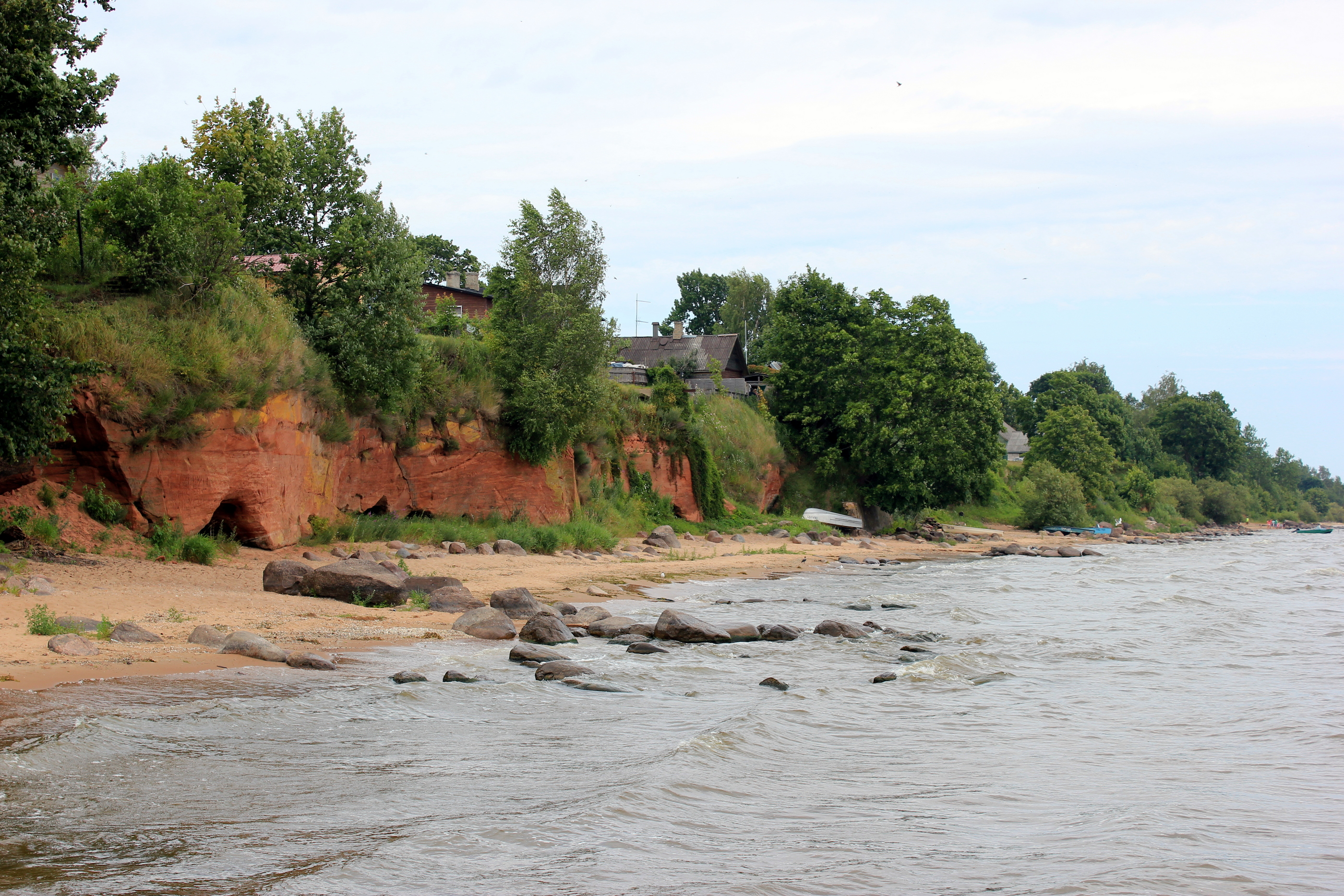 Am Peipussee in Kallaste, Estland.Hornjoserbsce: Při Peipuskim jězorje pola Kallaste, Estiska.